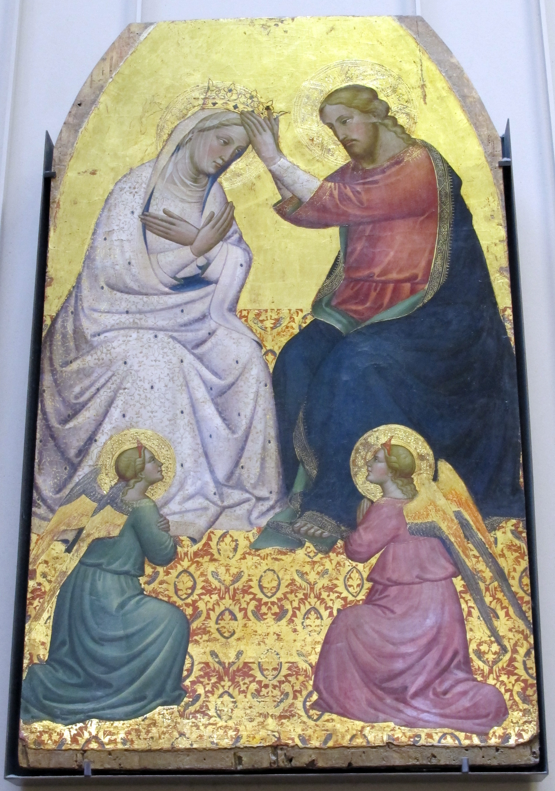 Pittura italiana del Trecento, Louvre